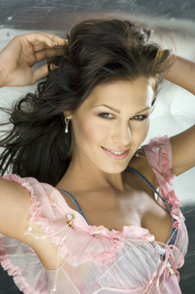 Jana Doleželová